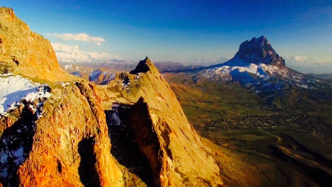 Culfa rayonu, Əlincə qalası və İlandağ